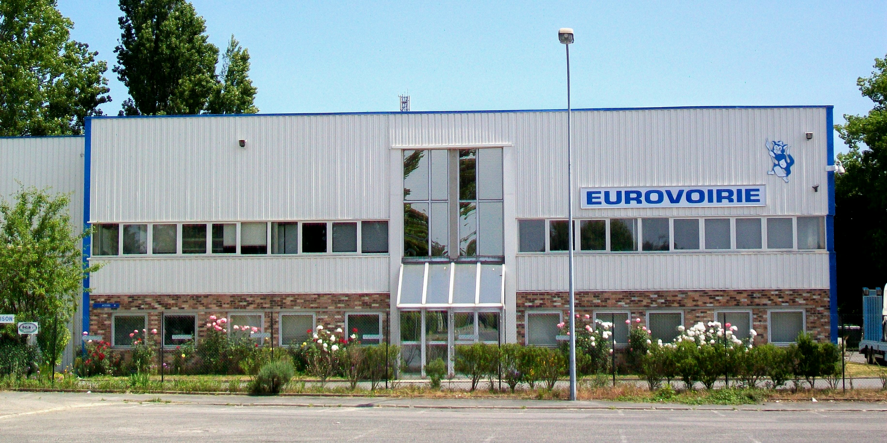 Eurovoirie, avenue Eugène-Gazeau.